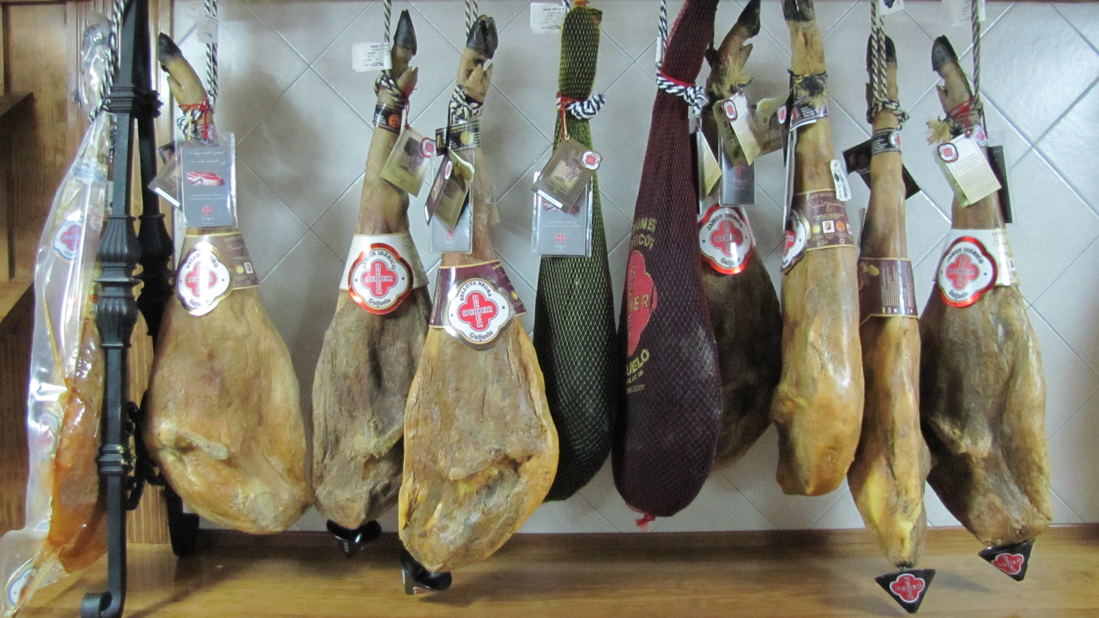 Jamones denominación de origen Guijuelo (Salamanca) España. En la foto se pueden observar varios jamones colgados, de BEHER, Bernardo Hernández. Entre los jamones se puede leer los diferentes tipos: "Bellota Oro", "Jamón Ibérico", "Bellota Negra",... A la izquierda uno de ellos se encuentra envasado al vacío.